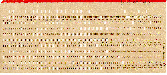 Wochenschlüssel T-310/50